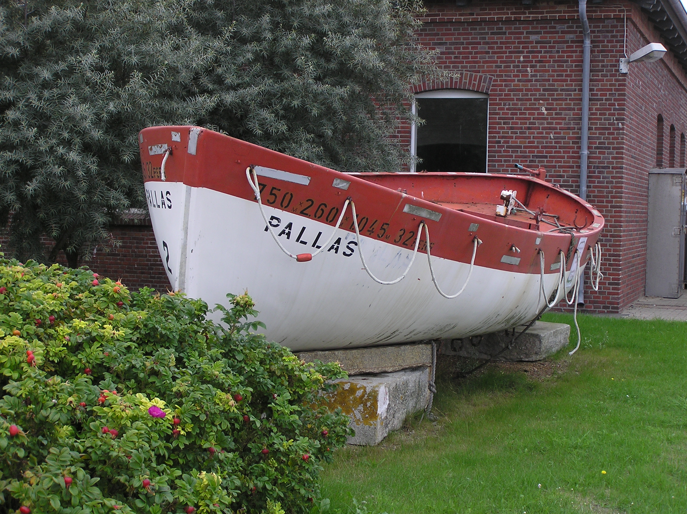 Rettungsboot der Pallas im Seezeichenhafen Amrum (Außenstelle des WSA Tönning)